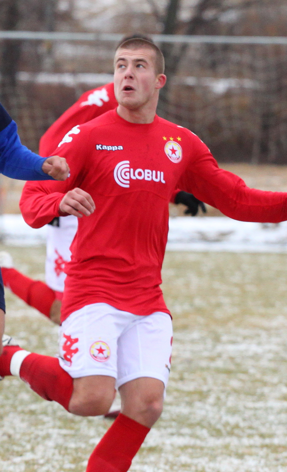 Ангел Грънчов - български футболист, състезател на ПФК ЦСКА (София)